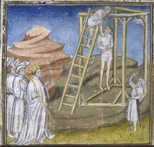 Herbert II de Vermandois pendu sur ordre de Louis IV d'Outremer